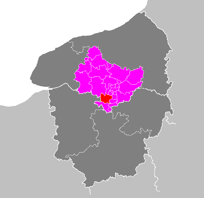 Maps of arrondissements and cantons of France: Arrondissement de Rouen - Canton de Grand-Couronne.PNG